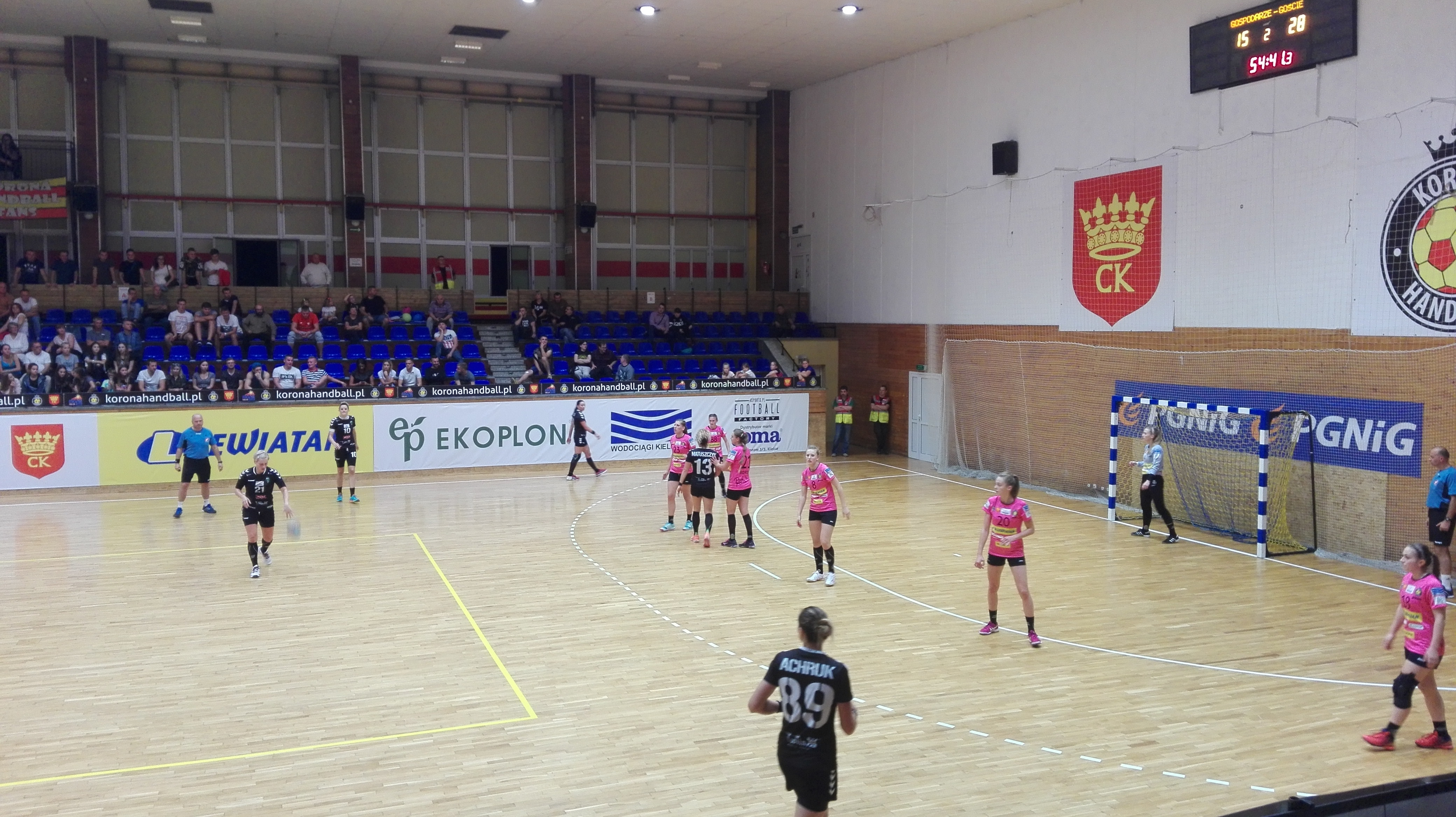 Mecz 1. kolejki Superligi kobiet w sezonie 2017/2018: Korona Handball Kielce - MKS Lublin (16:30), 9 września 2017 r., Kielce.